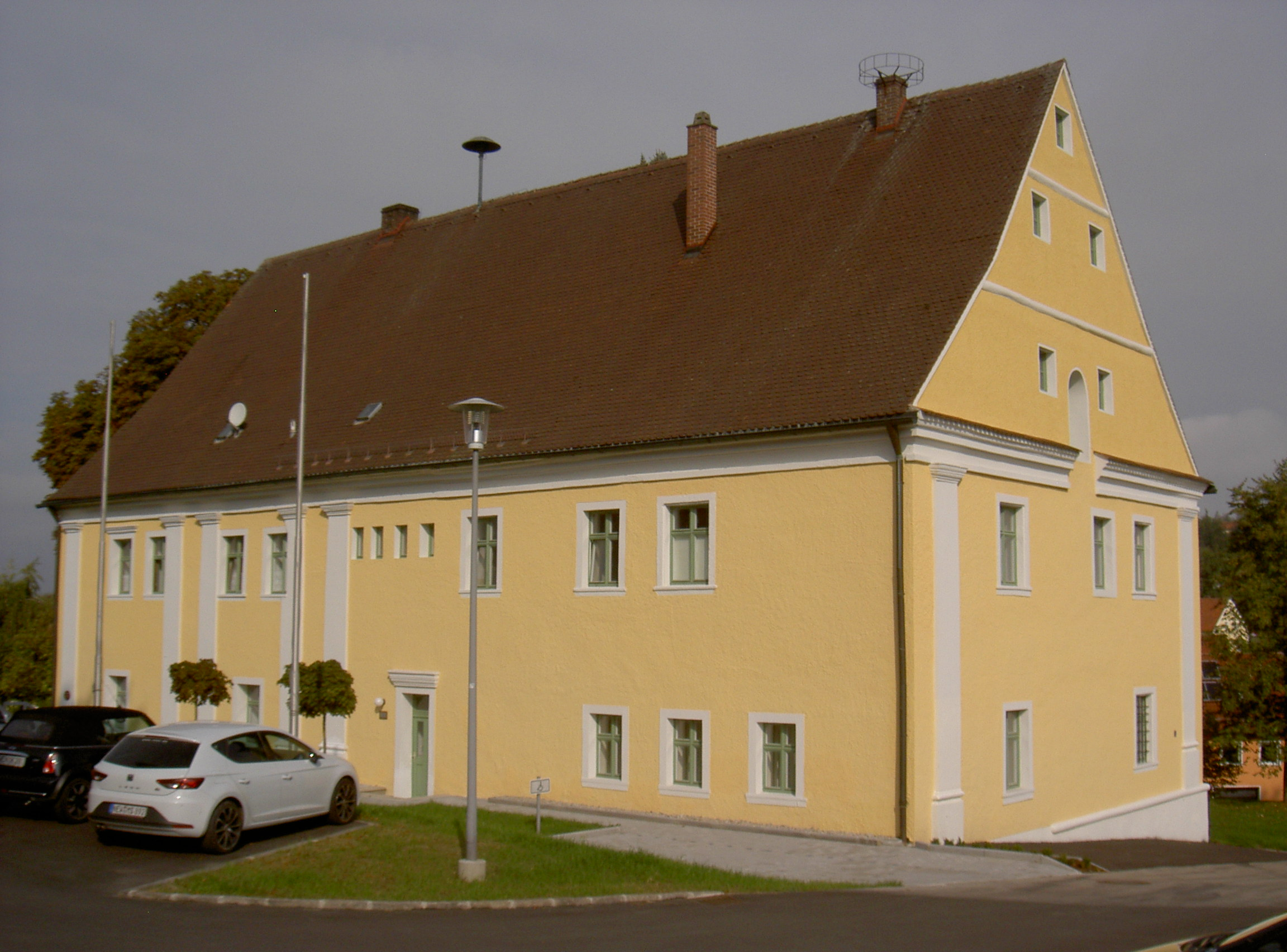 Pflegschloss Floß (Upper Palatinate)